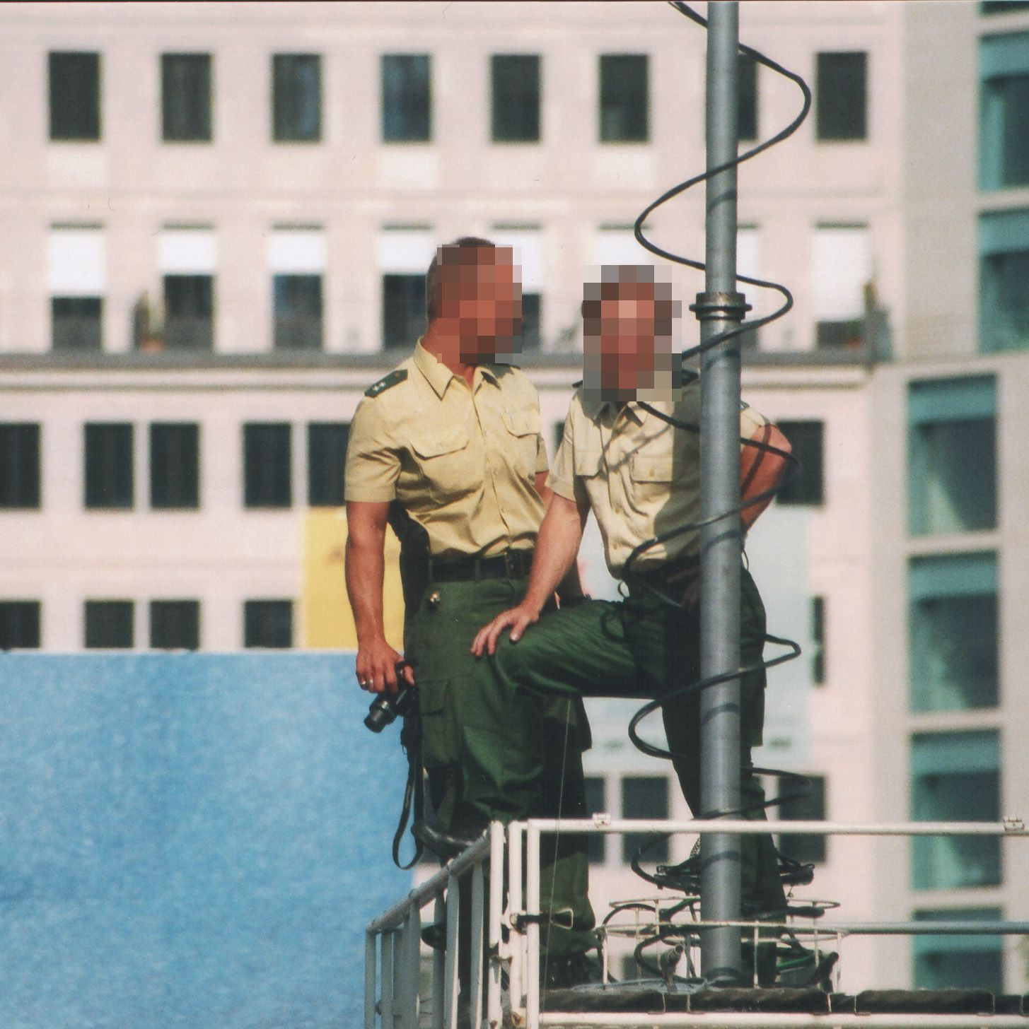 Deutsche Polizisten im Dienst. Aufgenommen waehernd einer Grossveranstaltung nahe Berlin Potsdamer Platz. Fotografiert von Klafubra im Sommer 2002